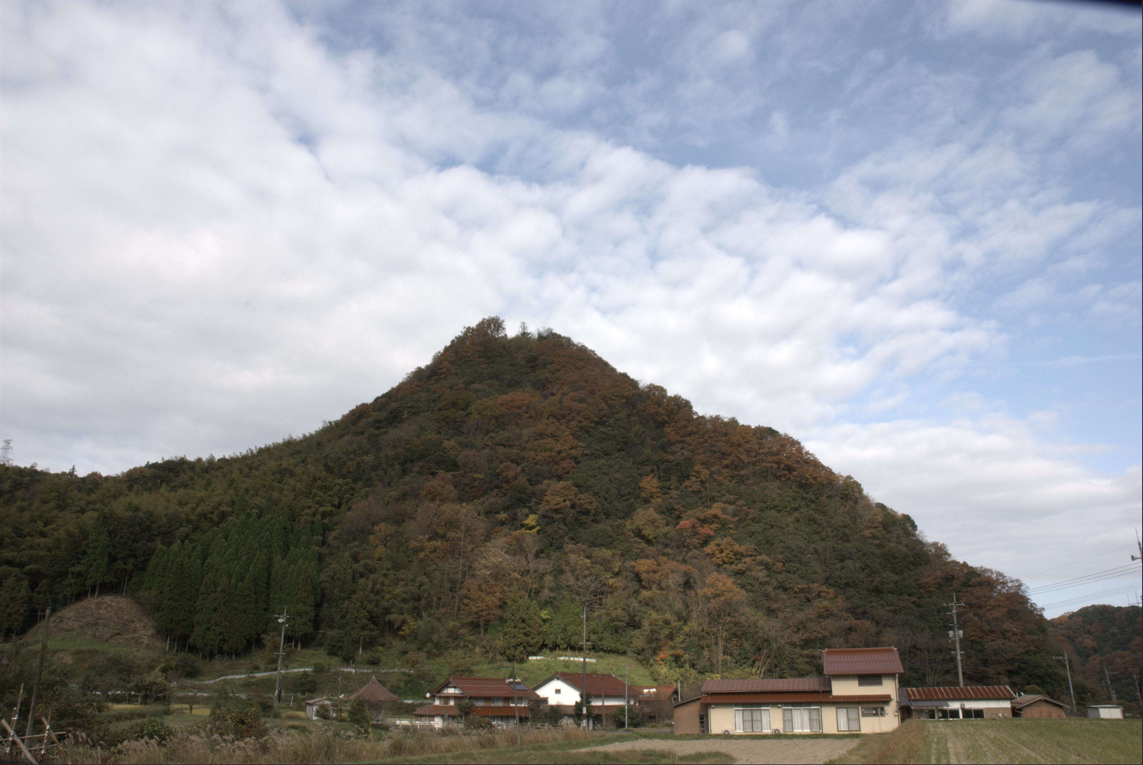 Kumano Castle